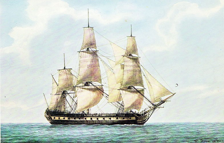 64-gun ship Flamand